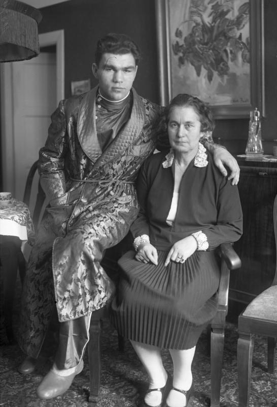 Triumpfsieg des deutschen Boxweltmeisters Max Schmeling in Amerika! In einem heroischen Kampf siegte Max Schmeling gegen den amerikanischen Schwergewichtsboxer Young Stribling entscheidend durch k.o. und verteidigte seinen bis dahin angezweifelten Weltmeistertitel ehrenvoll. Eine glückliche Mutter. Die Mutter des Boxweltmeisters Max Schmeling mit ihrem erfolgreichen Sohn Max.